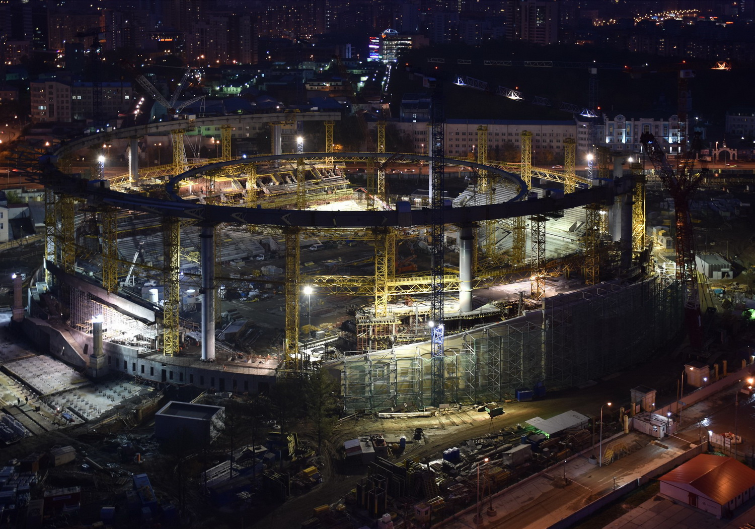 Стадион "Центральный" в Екатеринбурге в процессе реконструкции/подготовки к ЧМ-2018, вид с крыши ЖК "Крылов", октябрь 2016г